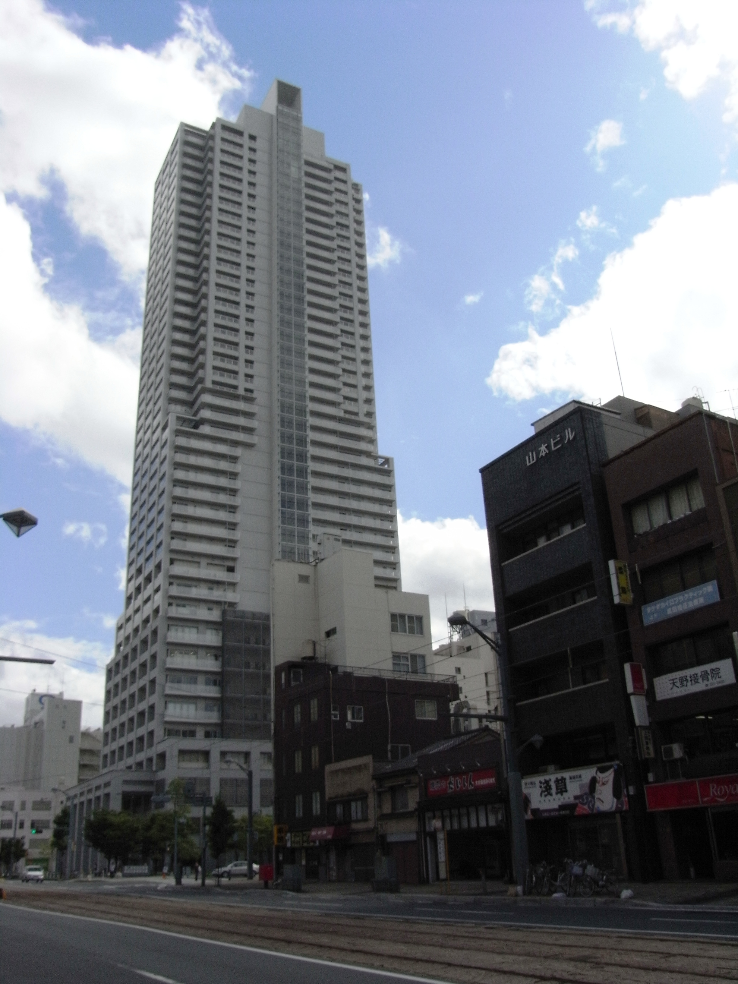 アーバンビューグランドタワー